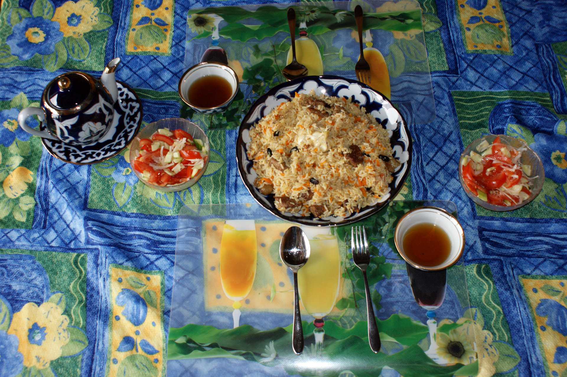 Plow mat Rëndfleesch a Korinten, dernieft Téi an Zalot.